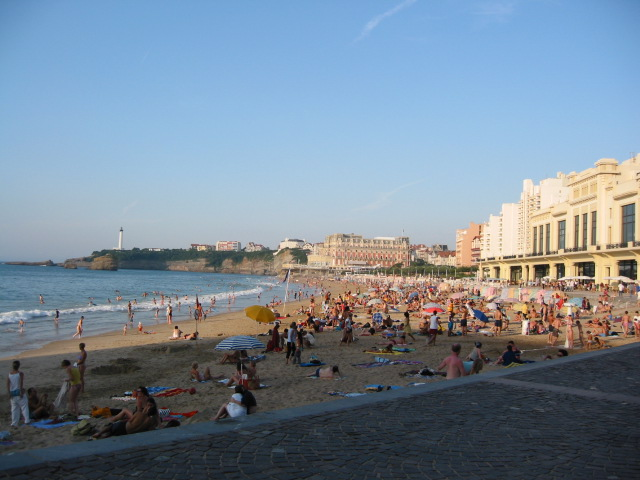 Biarritz, la grande plage. Photo prise le 27/08/03 par Harrieta171